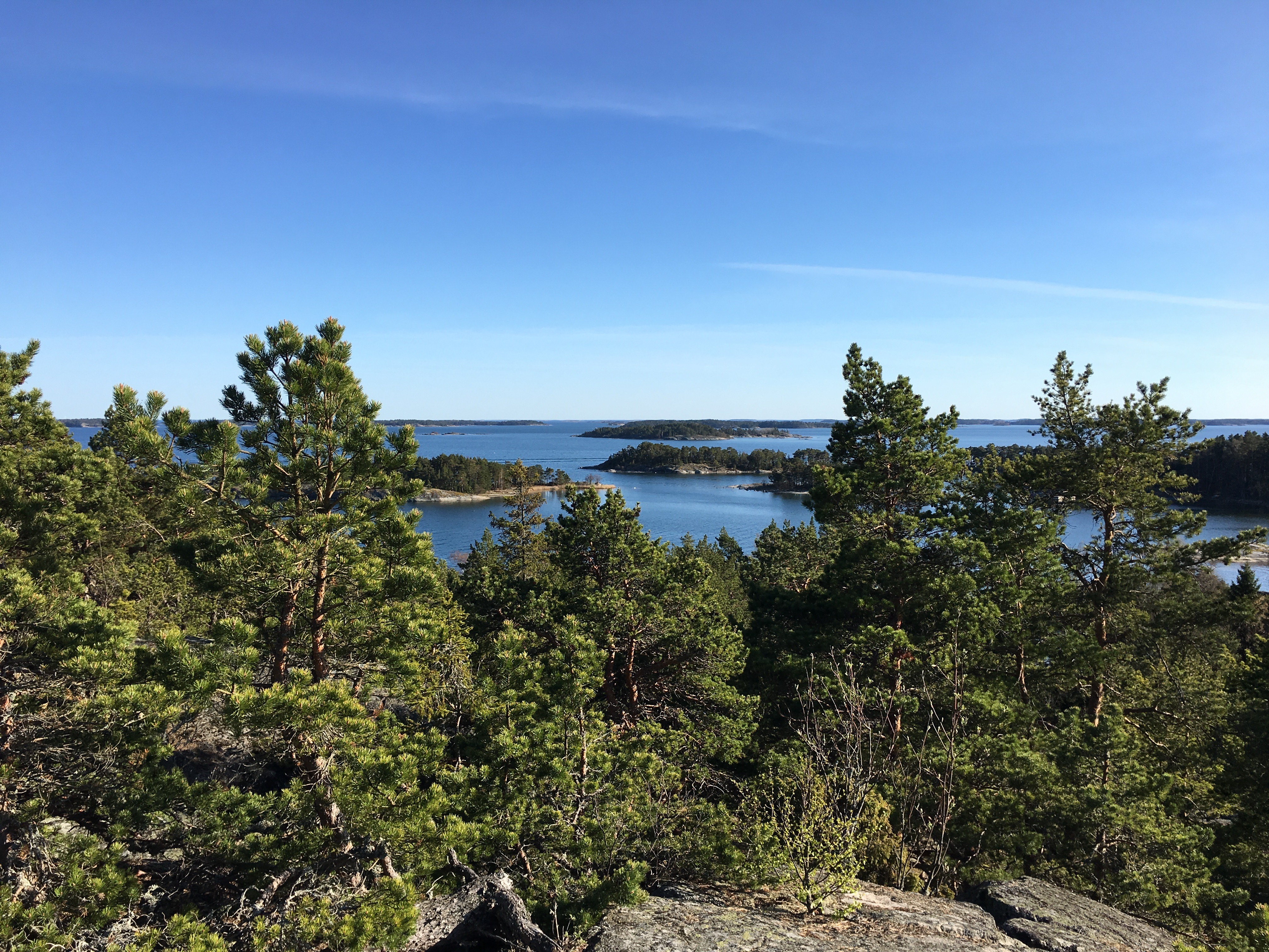 Pensarin luontopolulta